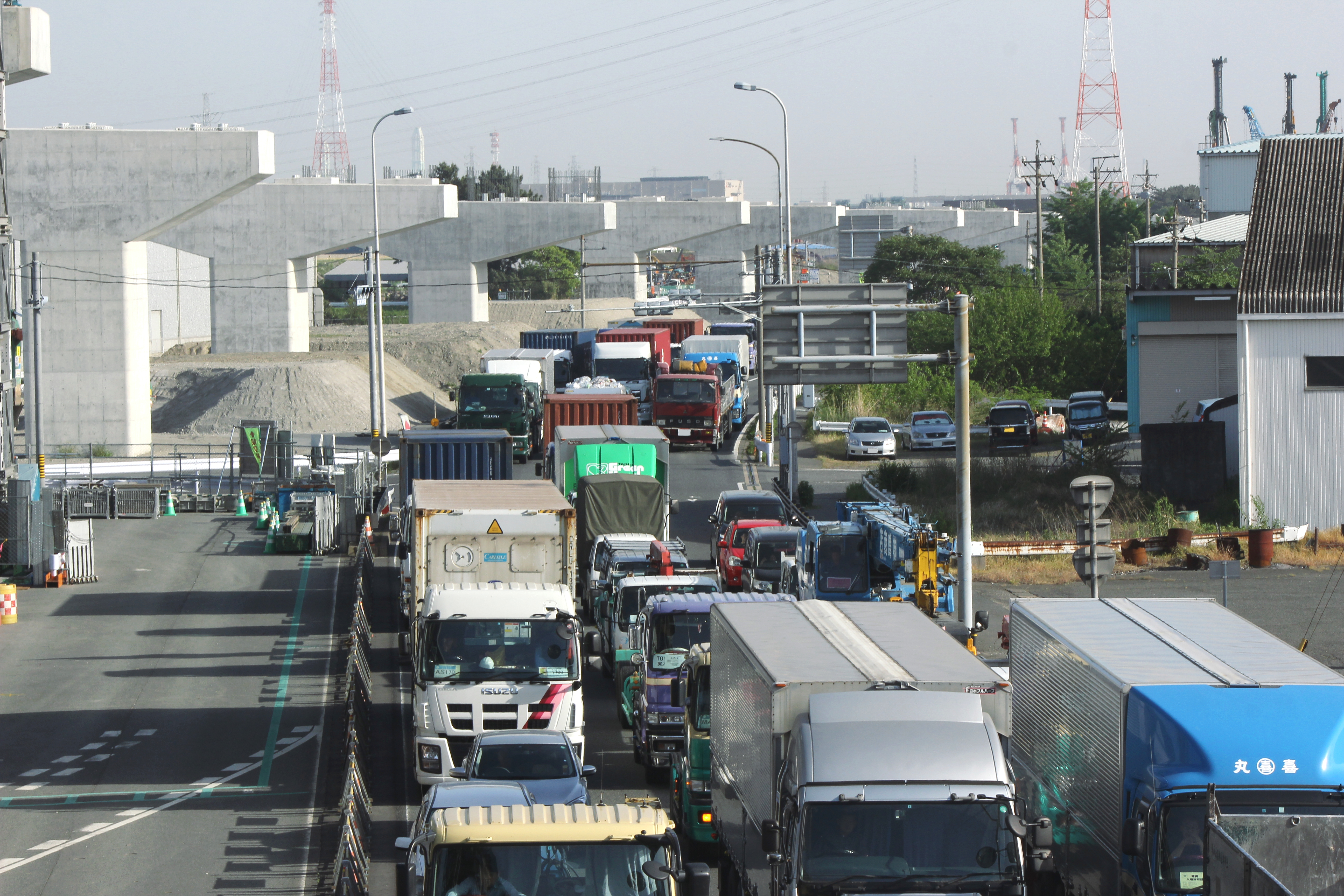 国道302号（梅之郷交差点付近・2017年5月）